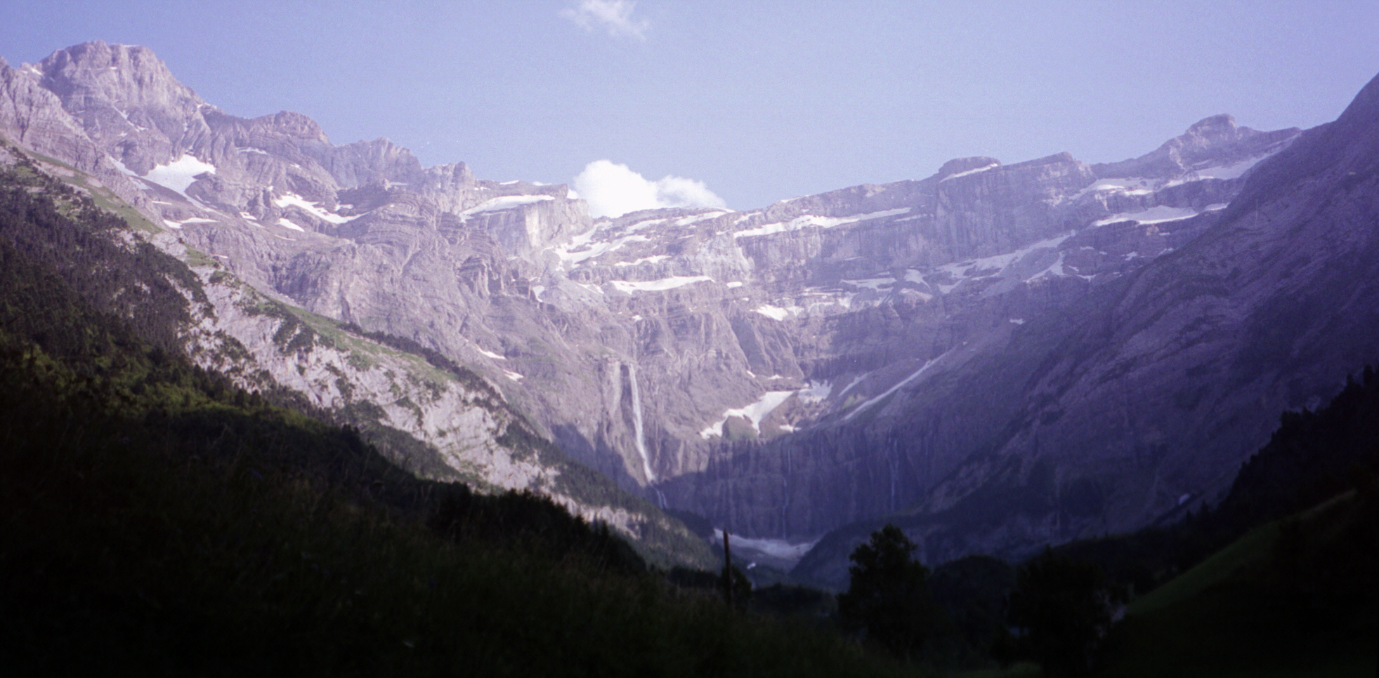 Cirque de Gavarnie, Hautes-Pyrénées, France